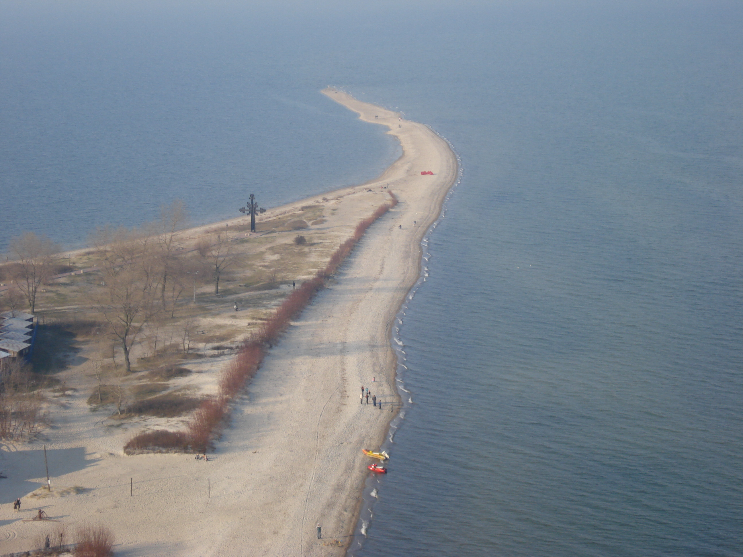 Przelot skrzydłem Oksywie-Puck